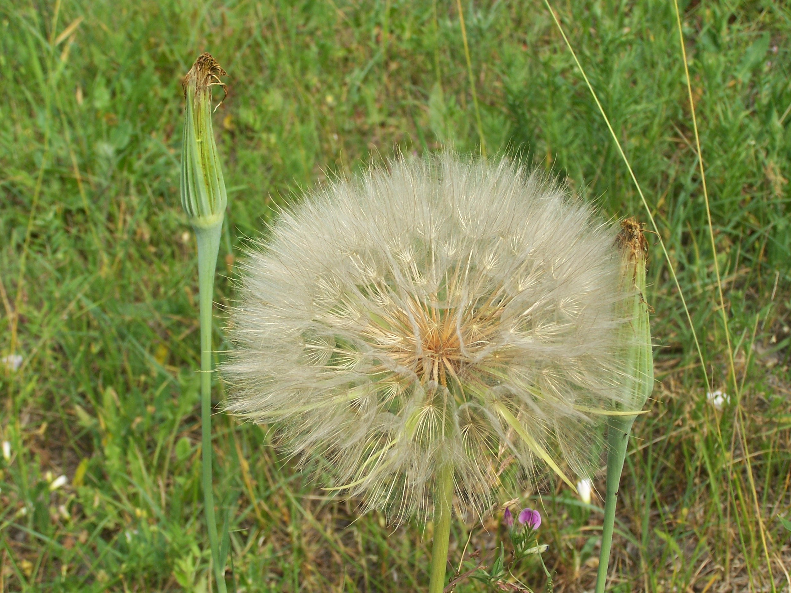 Tragopogon pratensis, Konstancin-Jeziorna, Poland